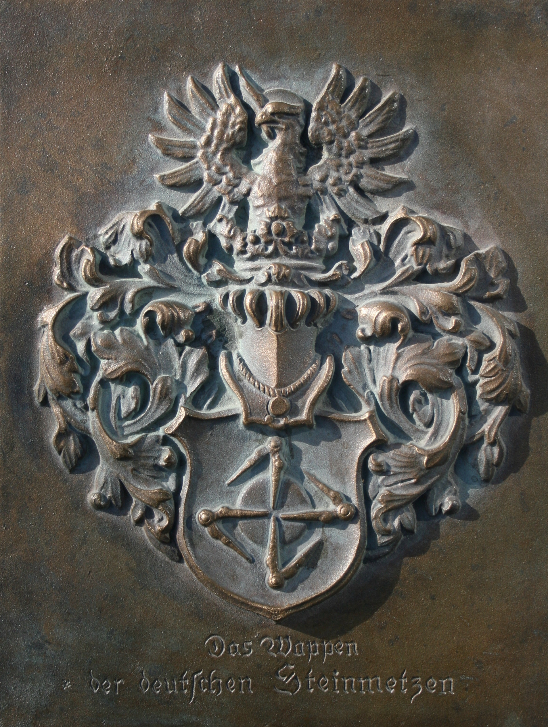 Steinmetzwappen